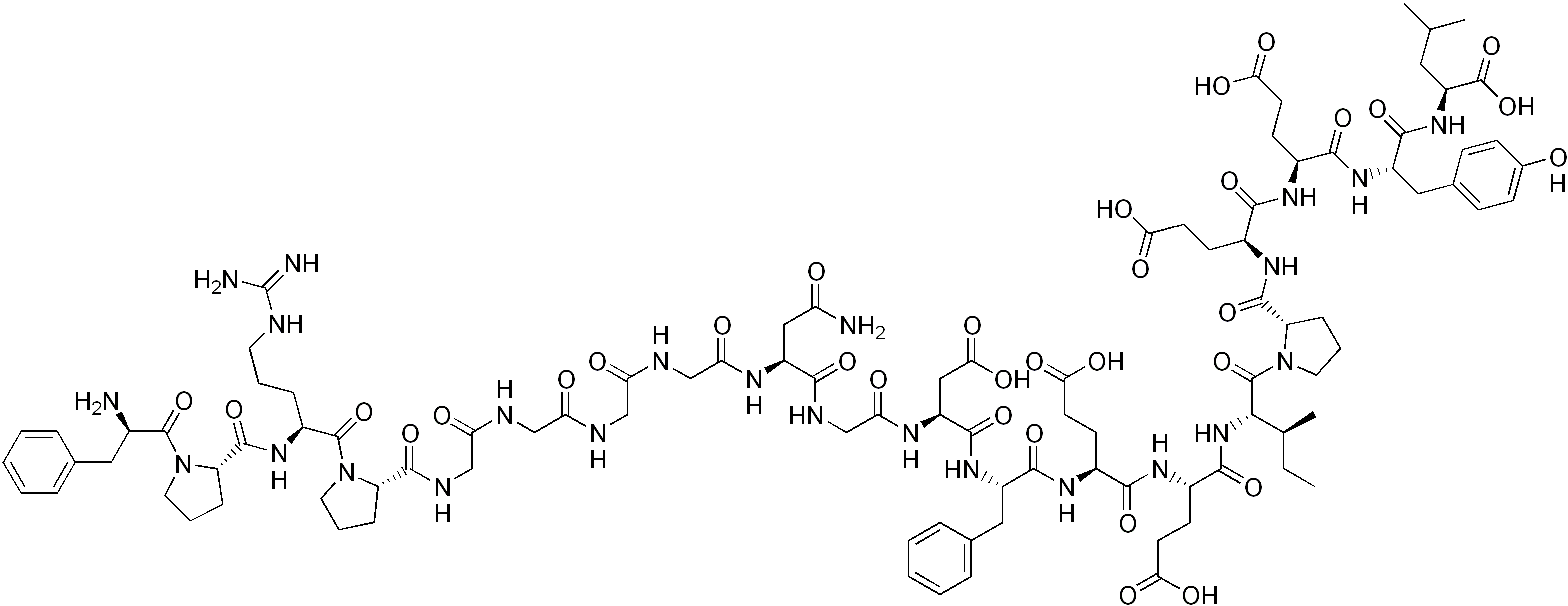 chemical structure of Bivalirudin